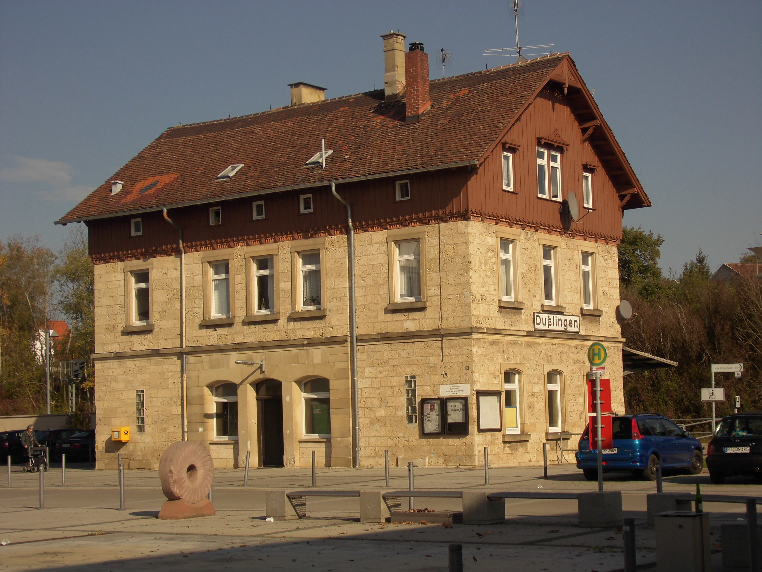 Bahnhof Dußlingen Bahnhofstraße 14; Station der Hohenzollernbahn (heute Zollernalbbahn) Empfangsgebäude, zweieinhalbgeschossig, Quadermauerwerk, Kniestock und Giebel verbrettert, an der Ostseite Bahnsteigüberdachung, Architekt Ludwig von Gaab, 1868/1869